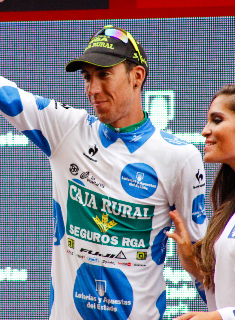 Vuelta a España 2015 | 8ª Etapa Puebla de Don Fadrique - Murcia-94